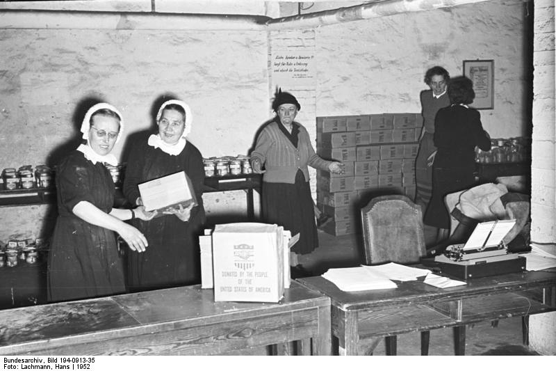 Care-Pakete Einlagerung 1952